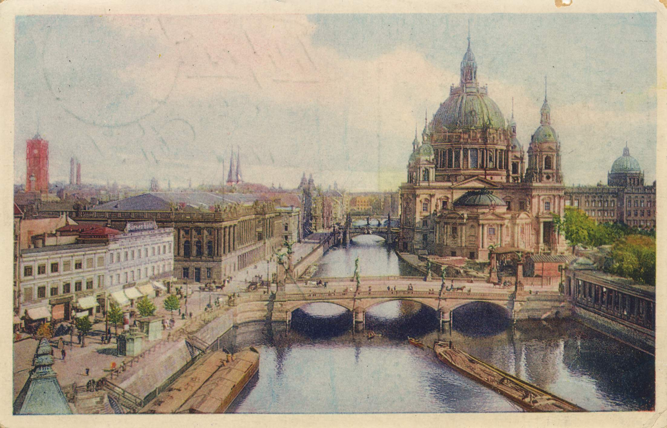 Ansicht des Berliner Doms, der Friedrichsbrücke, der Berliner Börse und des Börsen-Hotels.